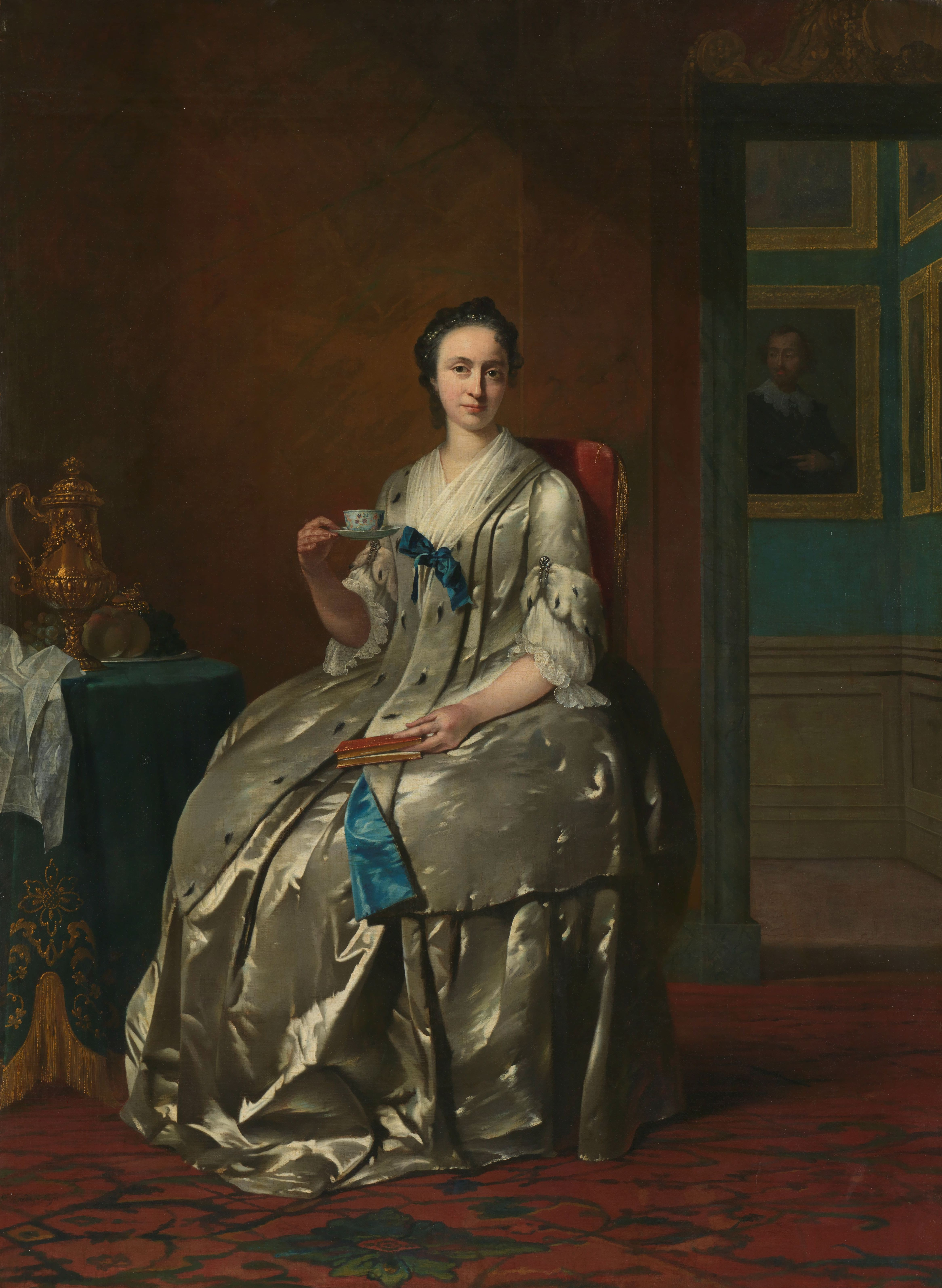 Portret van Machteld Muilman, de tweede echtgenote van Jan Pranger. Zittend, ten voeten uit in een stoel naast een tafeltje waarop een zilveren kan en fruit staan. In de rechterhand een kopje thee of koffie. Rechts een doorkijk naar een andere kamer haar schilderijen aan de wand hangen. Pendant van SK-A-2248.; Frans van der Mijn (1719-1783), olieverf op doek, ca. 1745-1747